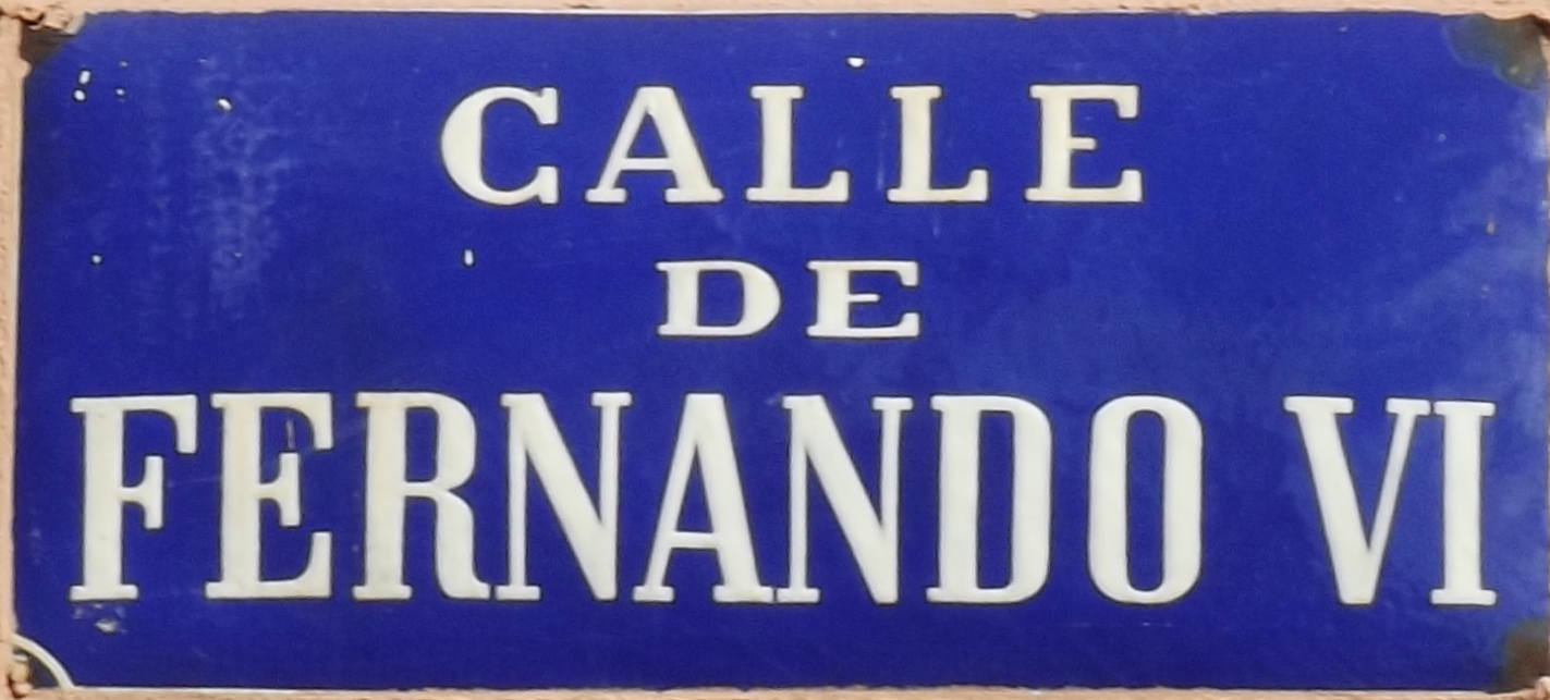 Placa de la calle de Fernando VI, Madrid.